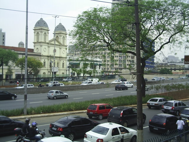 Avenida Tiradentes, Bom Retiro, São Paulo.